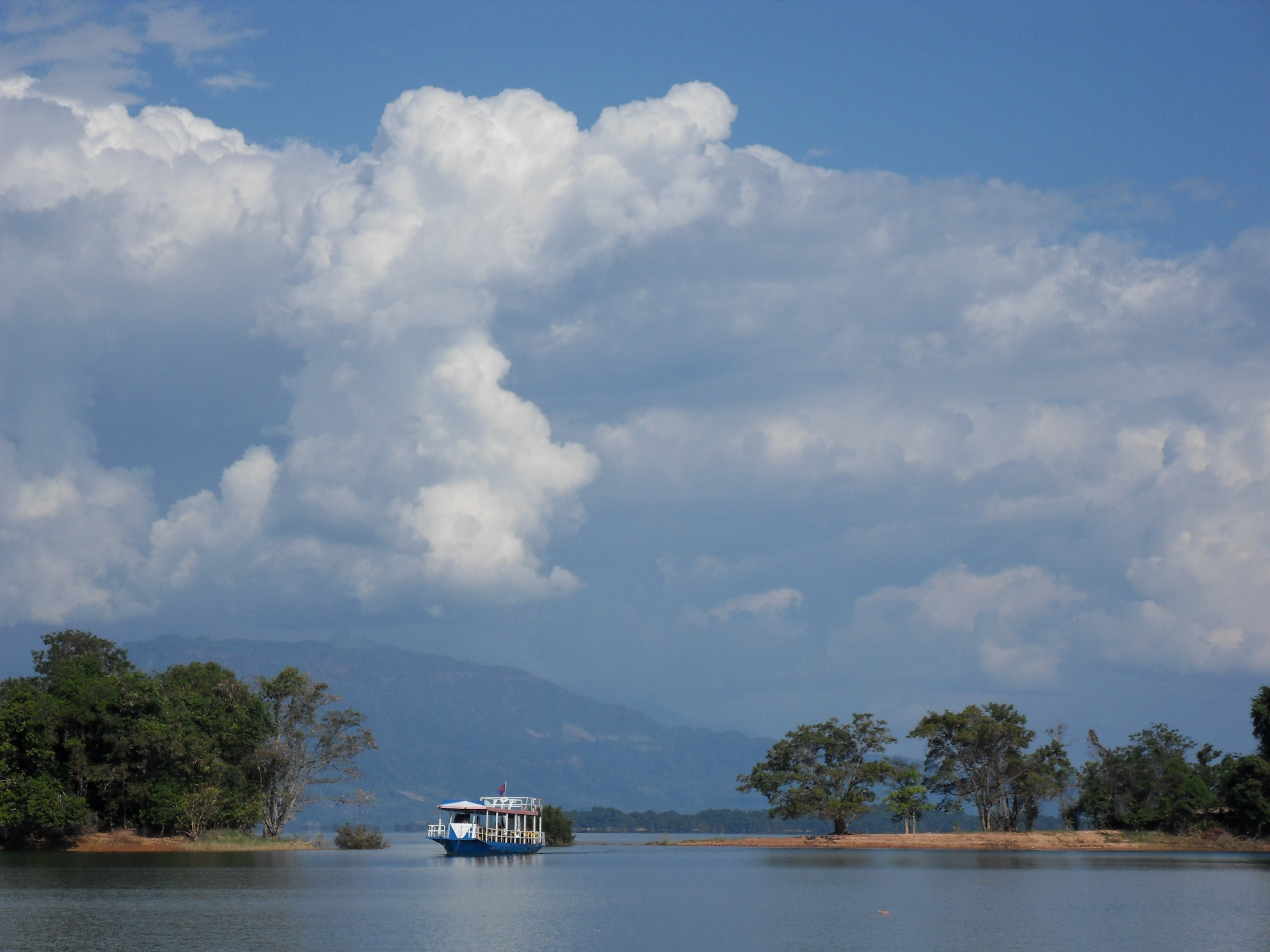 Un bateau de crois!ère sur le Lac de la Nam Ngum.